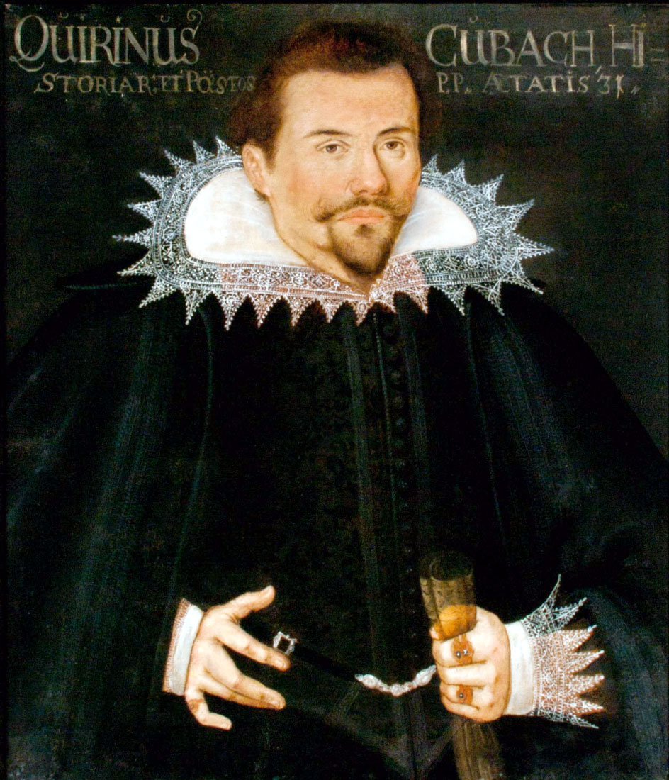 Quirinius Cubach (1589-1626) deutscher Historiker und Poet